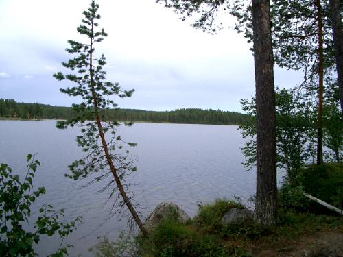 Kedträsket fotograferad från båthusen i Böle med Burvallsnäsan tv och Stornäsan th och Storsundet rakt fram.